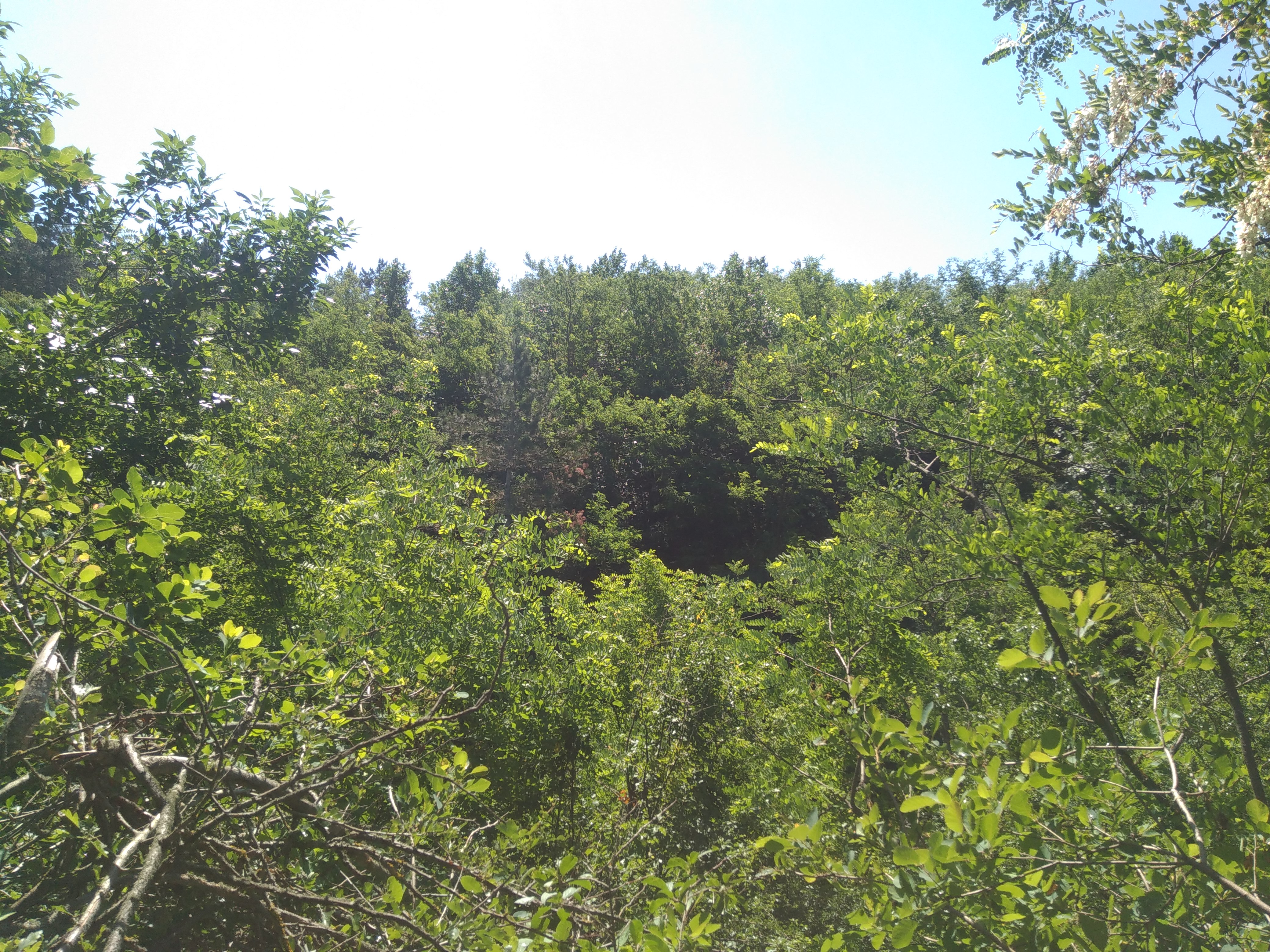 Aflorimentul Goian, monument al naturii amplasat în raionul Criuleni, la 0,5 km de intersecția autostrăzilor Leușeni și Chișinău-Criuleni, ocolul silvic Vadul lui Vodă, Leușeni-IV, parcela 32, subparcela 1 (cod MD-CR-mn.A-025) A-025